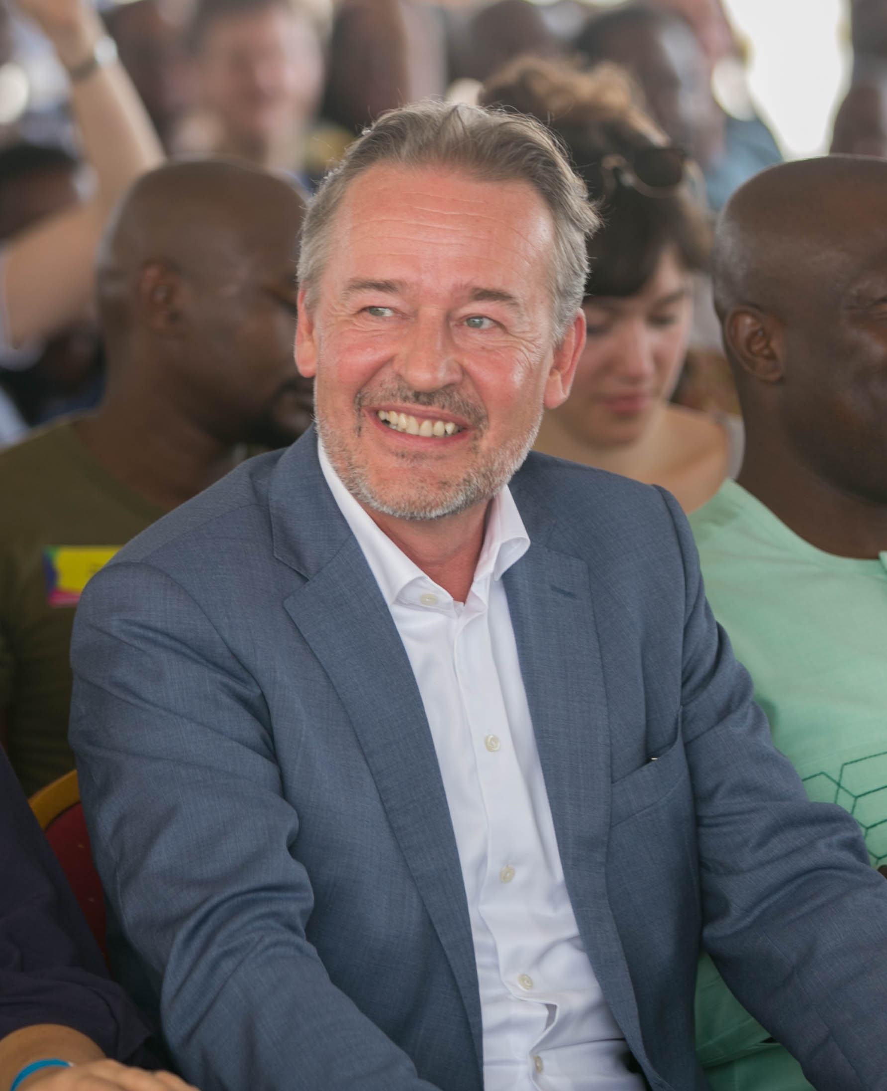 Photo: © Nana Afriyie